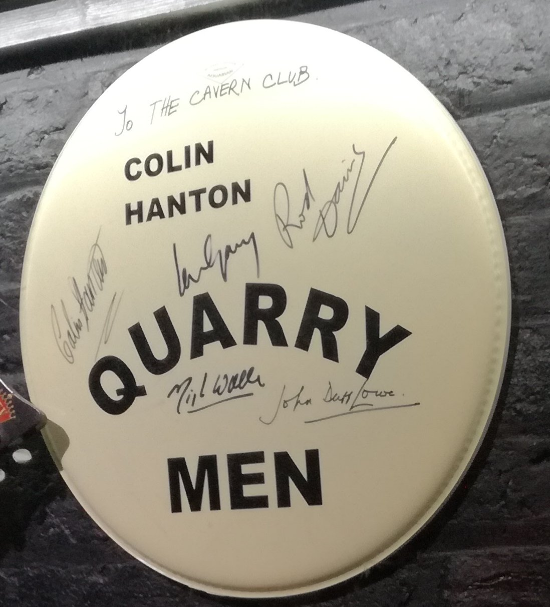 Autógrafos en parche batería The Cavern